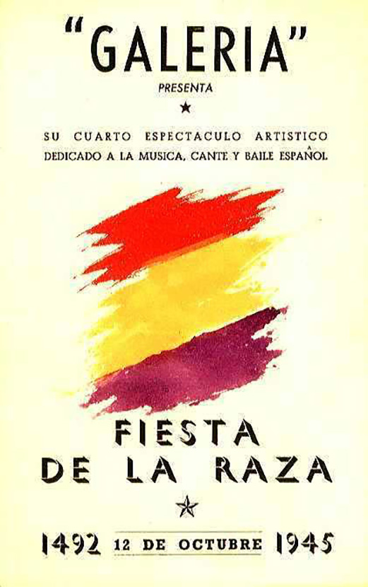 entête d'un programme artistique de la revue Galeria avec le drapeau républicain espagnol